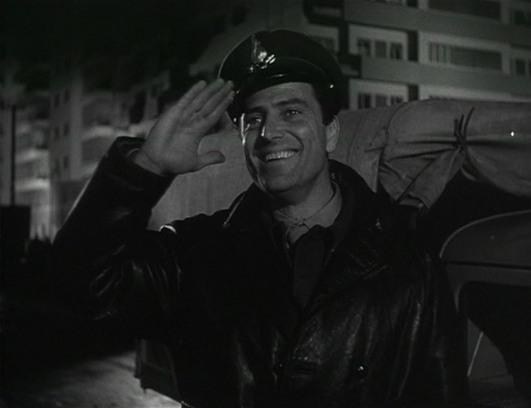 Screenshot del film Il segno di Venere (1955) di Dino Risi.